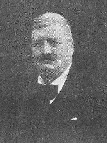 Manuel Amor Meilán, retrato en Vida Gallega, 1933